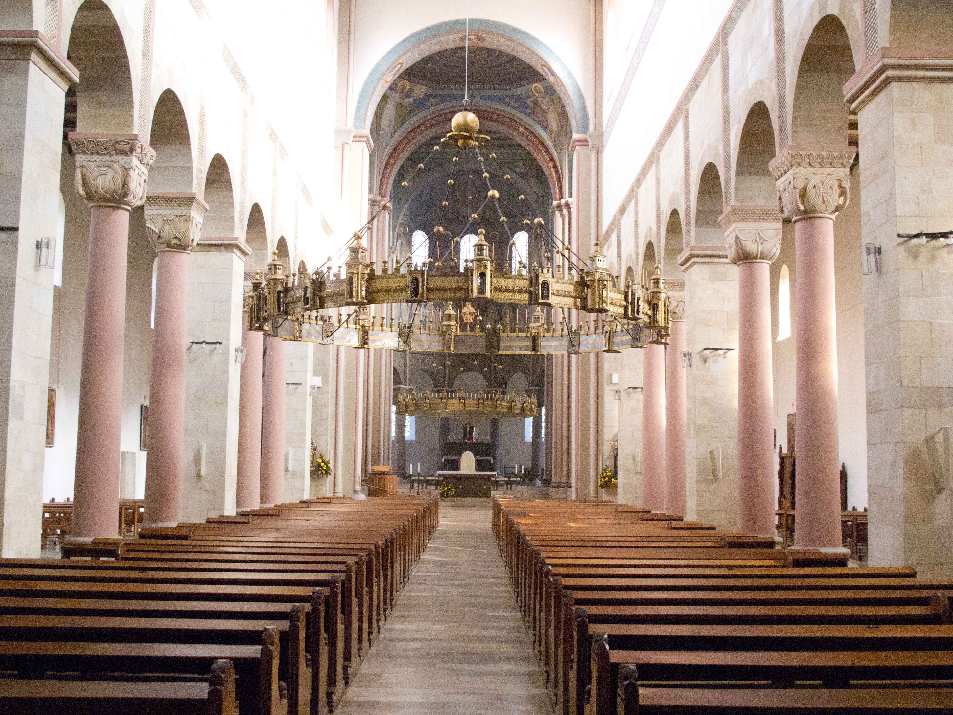 St. Godehard (Hildesheim), Mittelschiff mit dem für die Dauer der Domsanierung dort aufgehängtem Heziloleuchter (im Vordergrund)